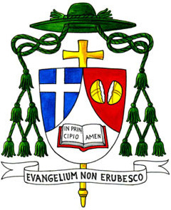 Lo stemma ufficiale di Mons. Luciano Monari, Vescovo di Brescia